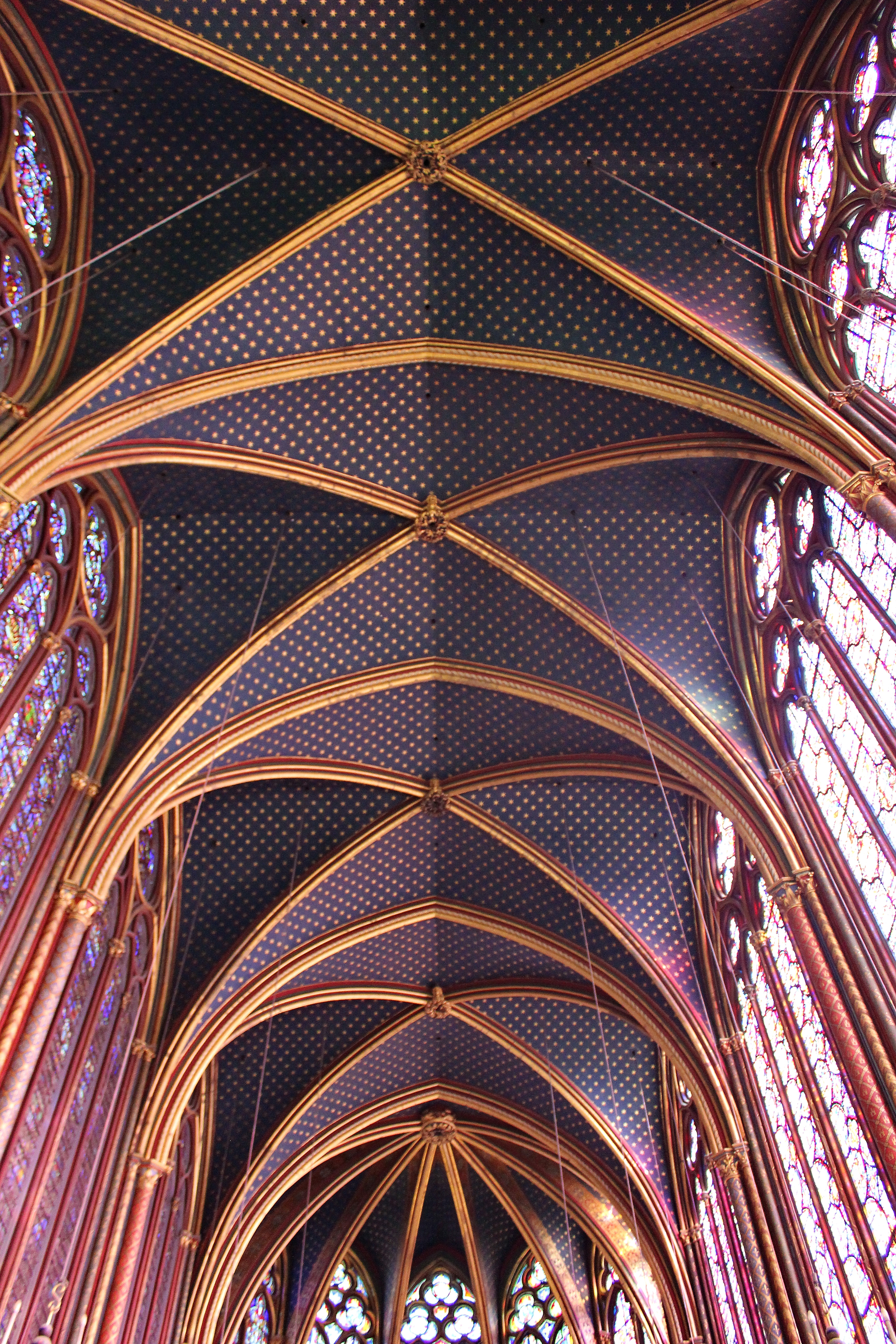 Sainte Chapelle Decke